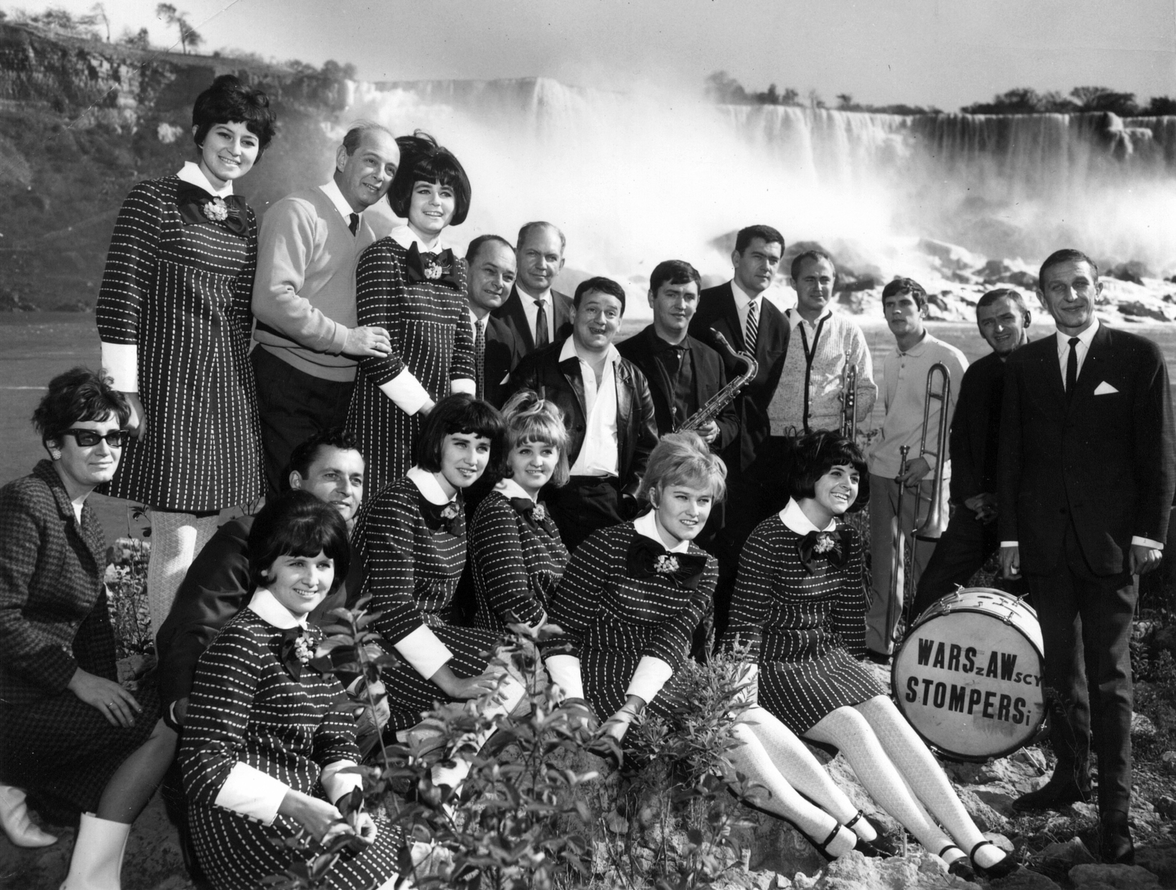 Filipinki, Jan i Halina Janikowscy, Włodzimierz Patuszyński, Warszawscy Stompersi, Aleksander Nizowicz i Jerzy Górny przy wodospadzie Niagara podczas trasy koncertowej w Stanach Zjednoczonych, październik 1966 r.